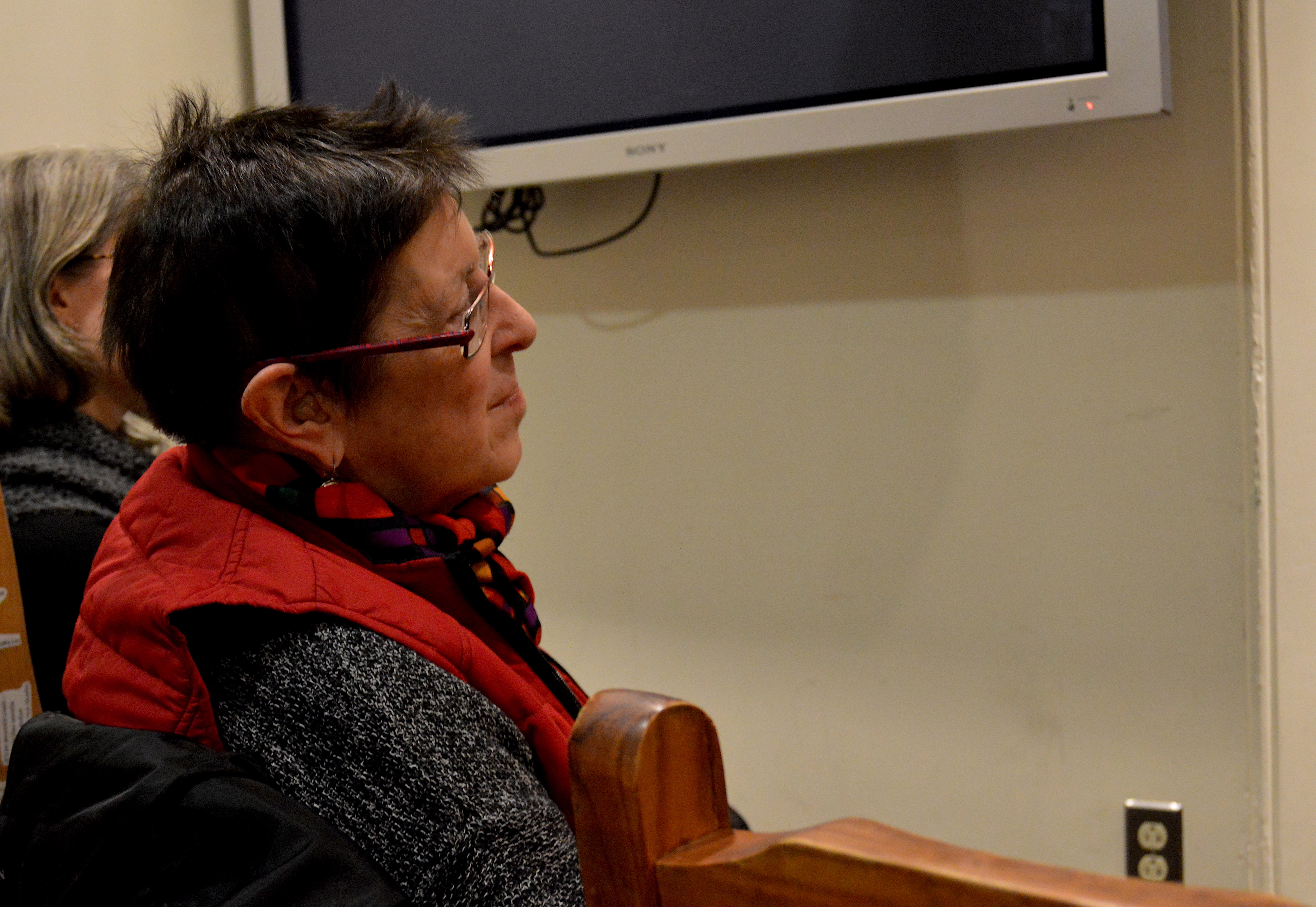 Rachel Blau DuPlessis